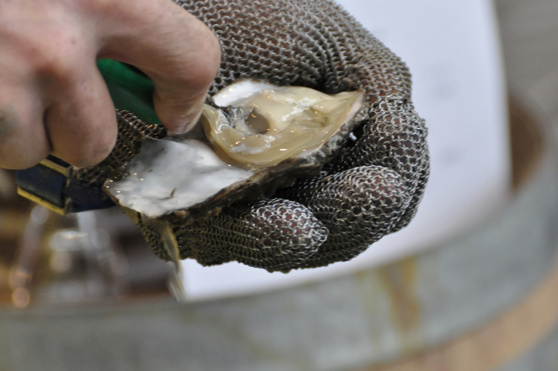 Messe_Slow_Food_2012 in Stuttgart Dieses Foto entstand durch Unterstützung des gemeinnützigen Vereins Skillshare.eu Skillshare e.V. ist ein eingetragener gemeinnütziger Verein zur Förderung der Bildung durch Unterstützung der Erstellung, Sammlung und Verbreitung so genannten freien Wissens. IBAN: DE16 8306 5408 0004 8850 66 BIC: GENODEF1SLR Bank: VR-Bank Altenburger Land